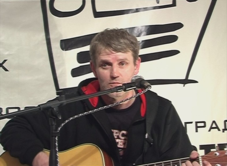 Выступление Олега Судакова (Манагера) в Волгограде на квартирном концерте 21 февраля 2009 года. Данное изображение - кадр из видеозаписи концерта, размещенной на YouTube (ссылка).